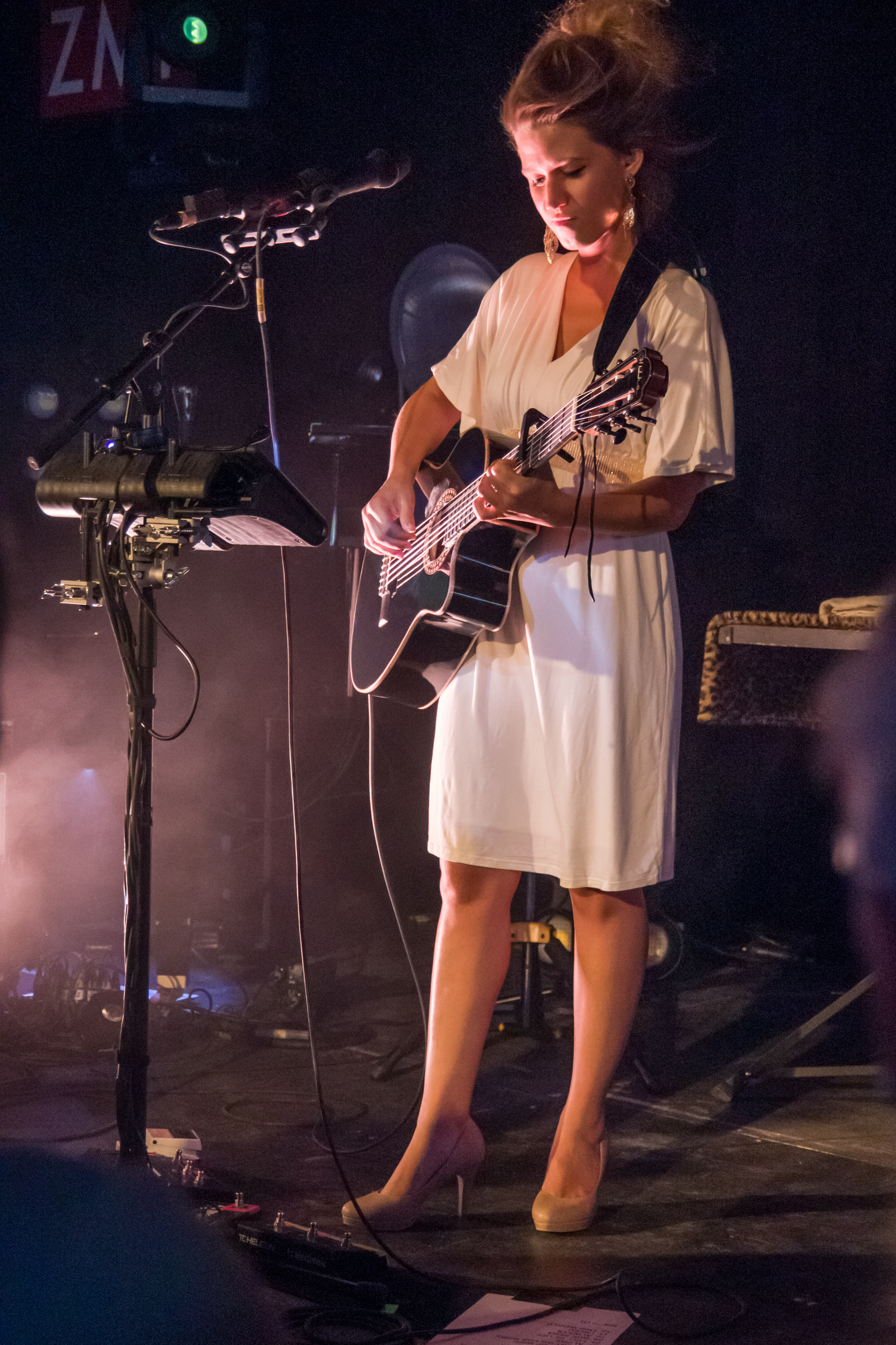 Das Zelt-Musik-Festival 2018 in Freiburg im Breisgau 26.07.2018 Selah Sue